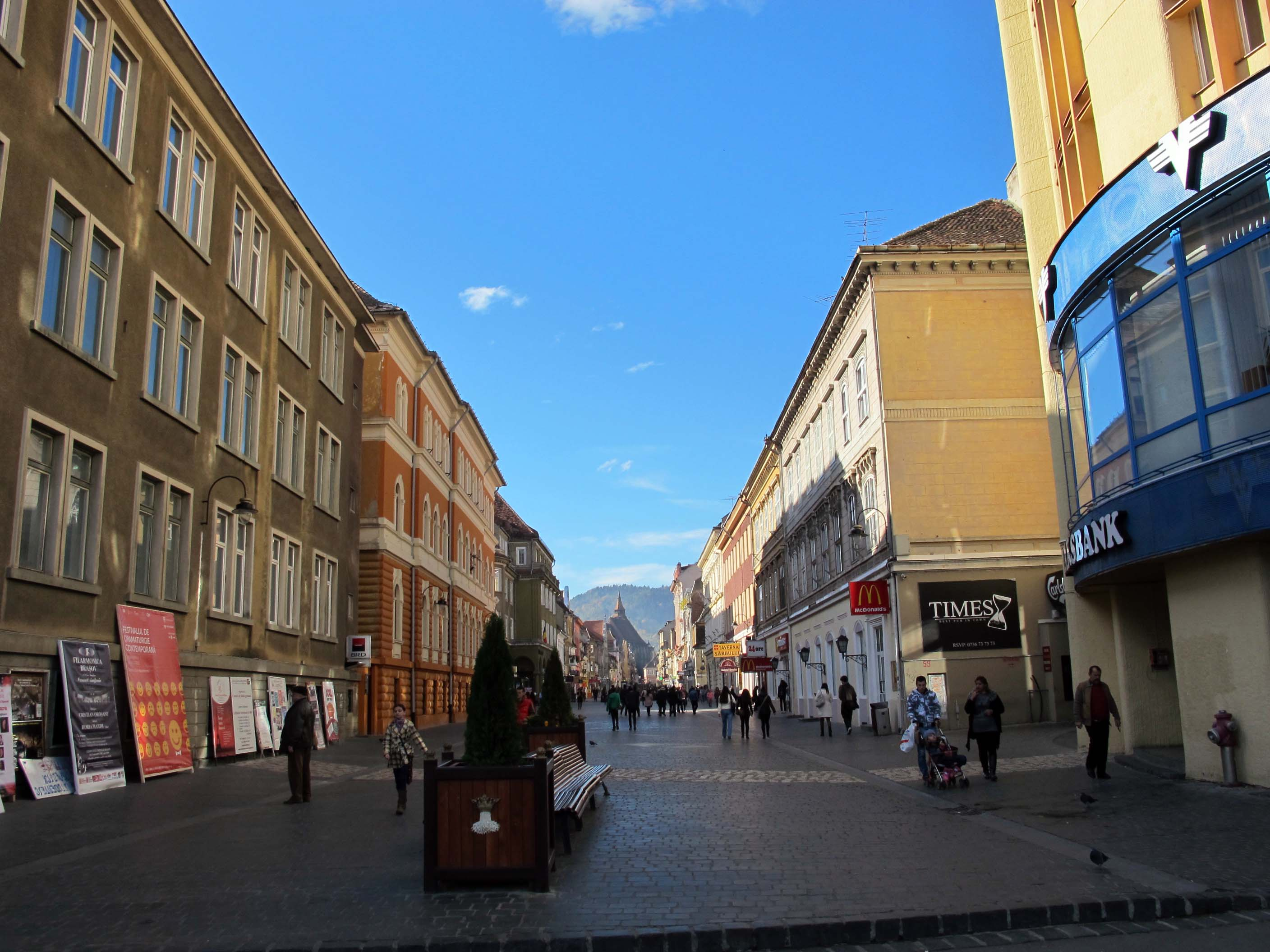 Brasov, via della repubblica